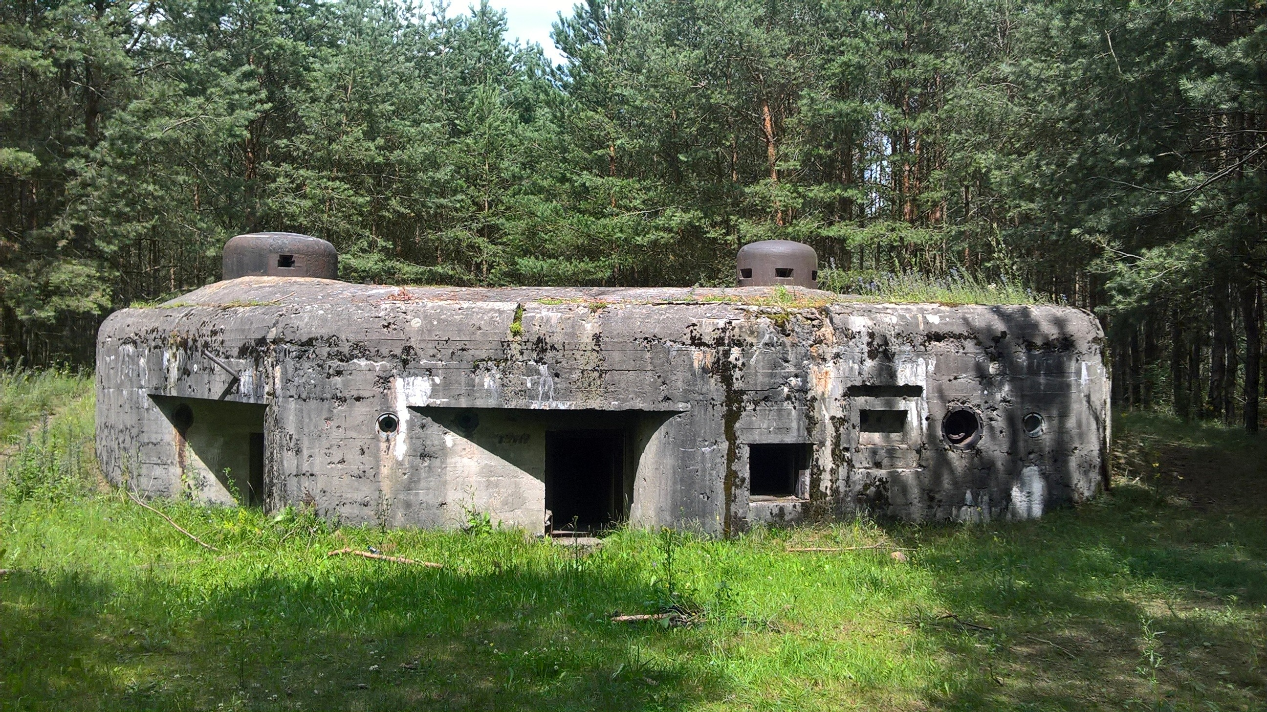 Polski ciężki schron bojowy drugiej linii obrony „Odcinka Nowogród” z 1939 r.